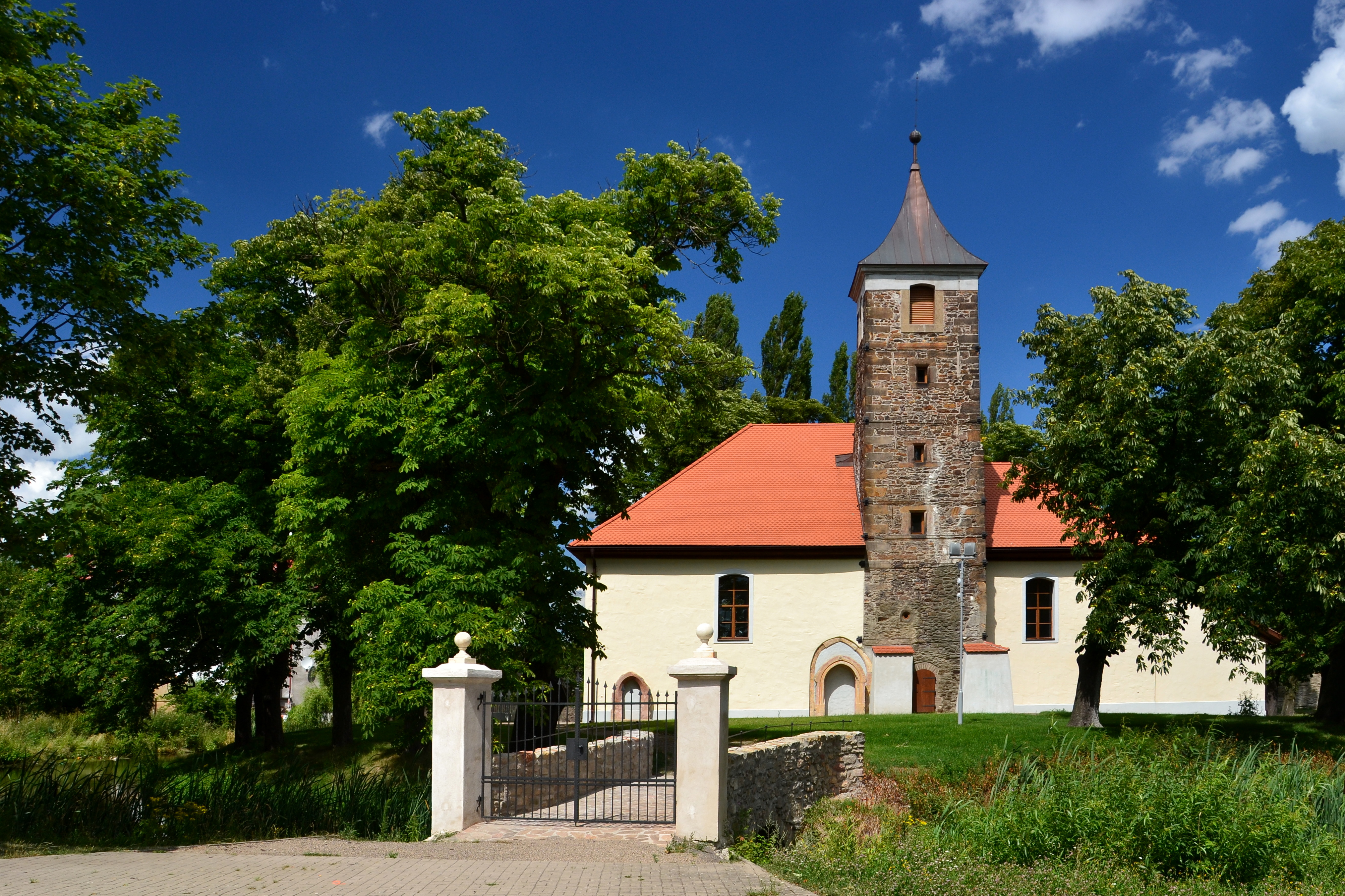 Kostel svatého Bartoloměje, Spořice.